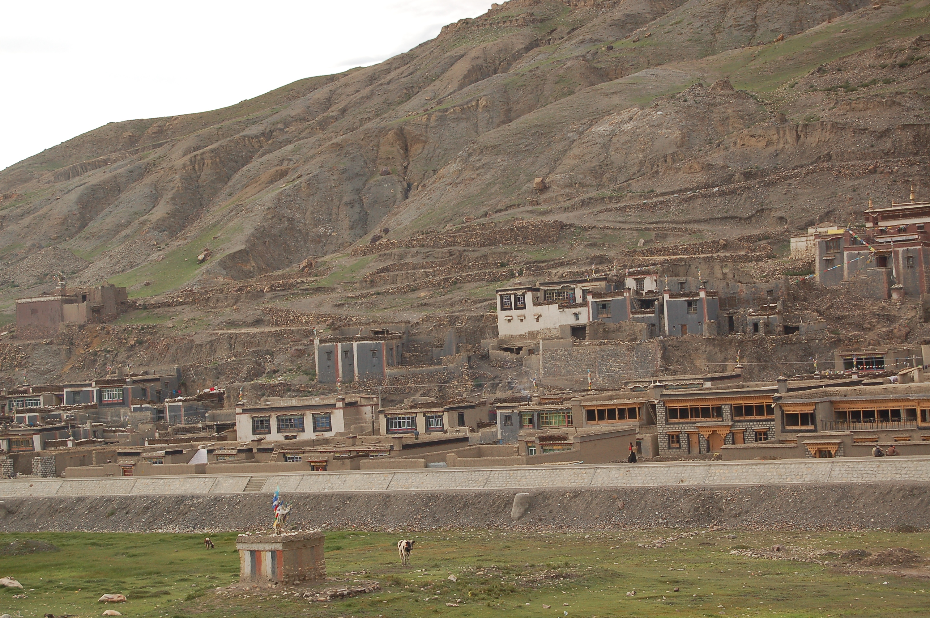 Saskya, Reste des völlig zerstörten Nordklosters mit Neubauten